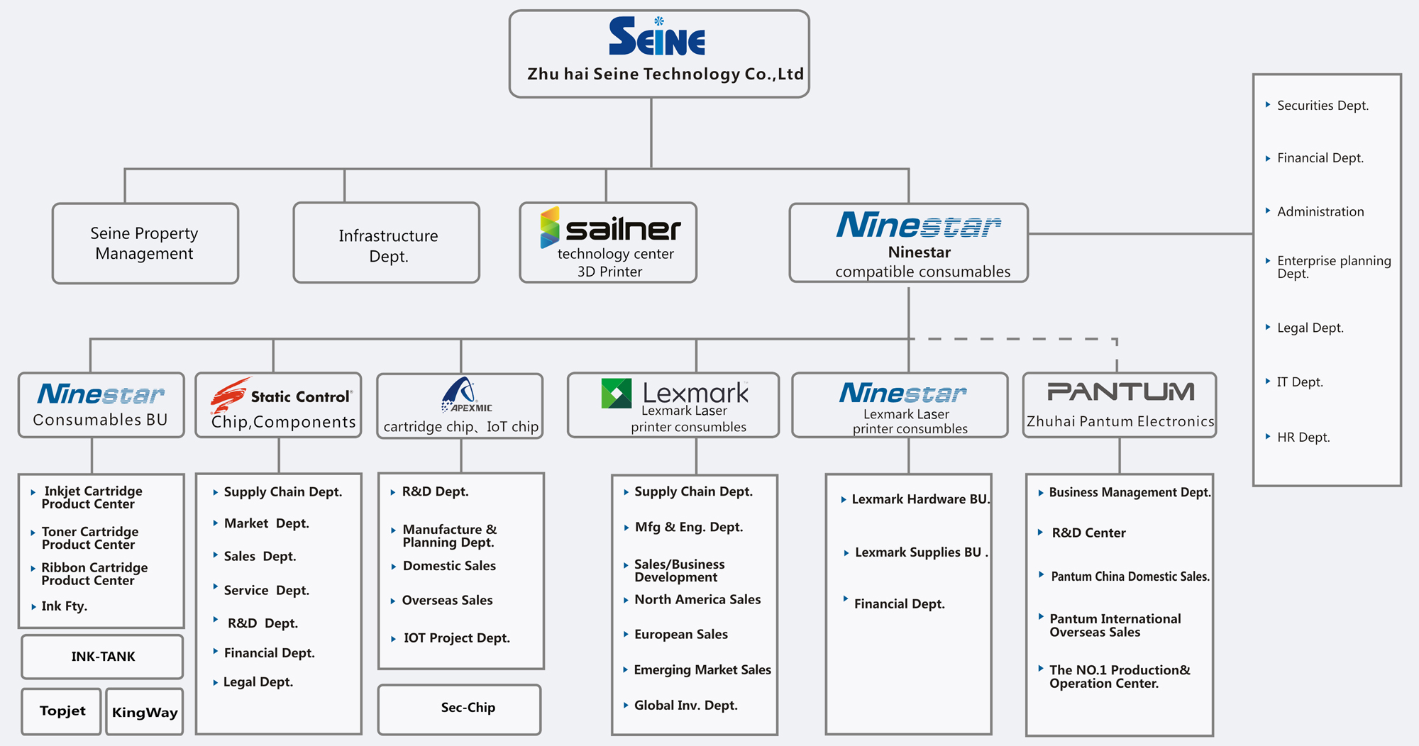 Konzernstruktur der Zhu Hai Seine Technology Co Ltd